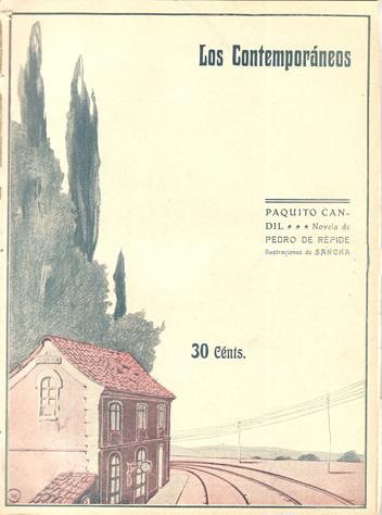 Portada de Paquito Candil.